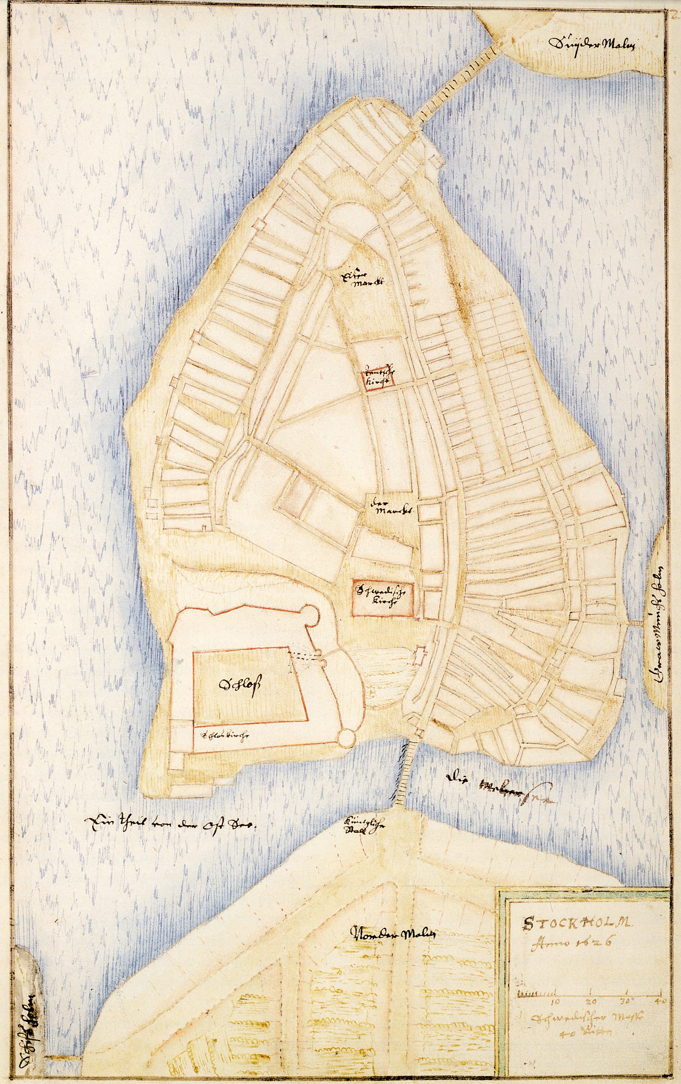 Stadsplan för Gamla stan 1626